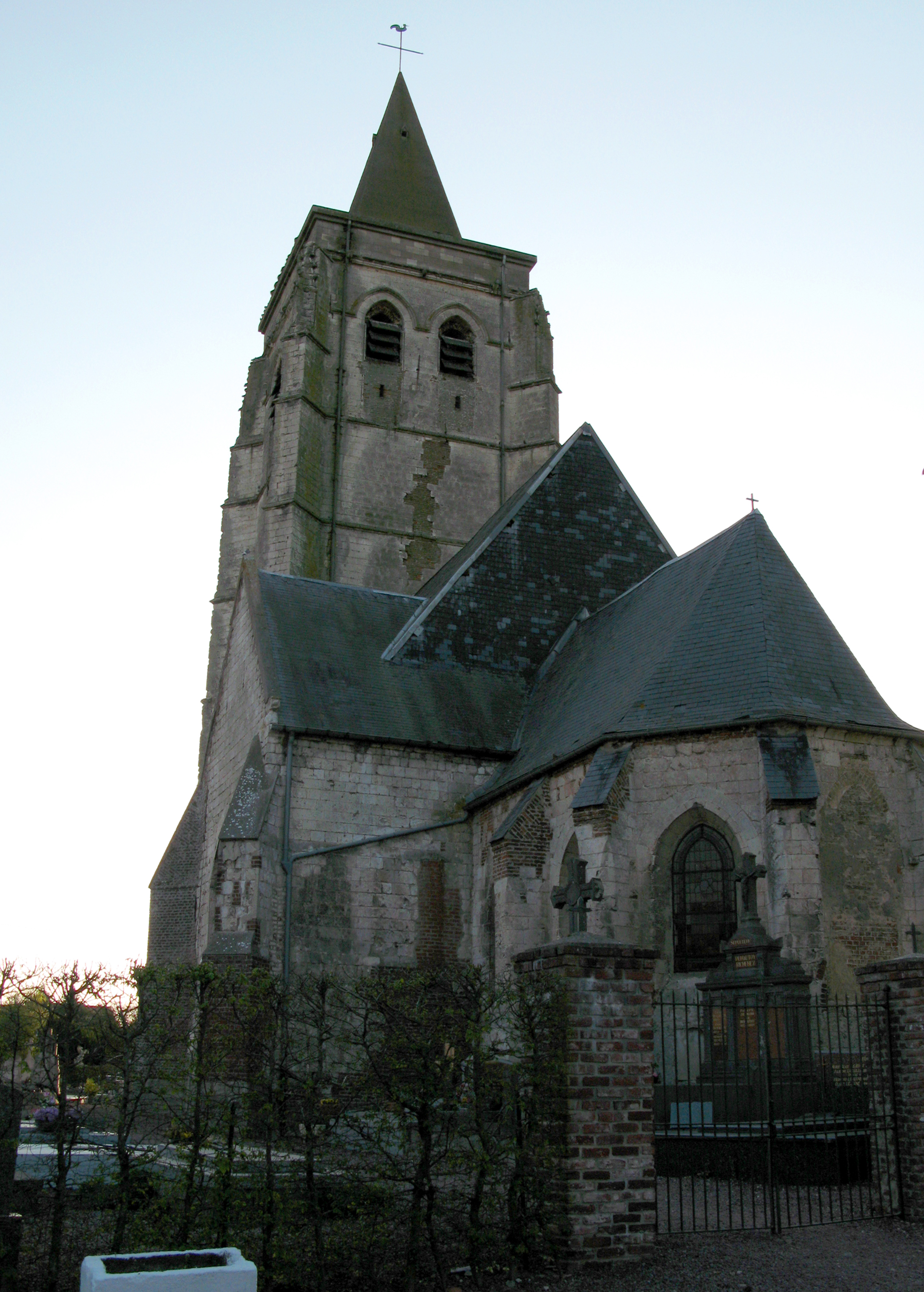 Valhuon (Pas-de-Calais, France) - L'église. .